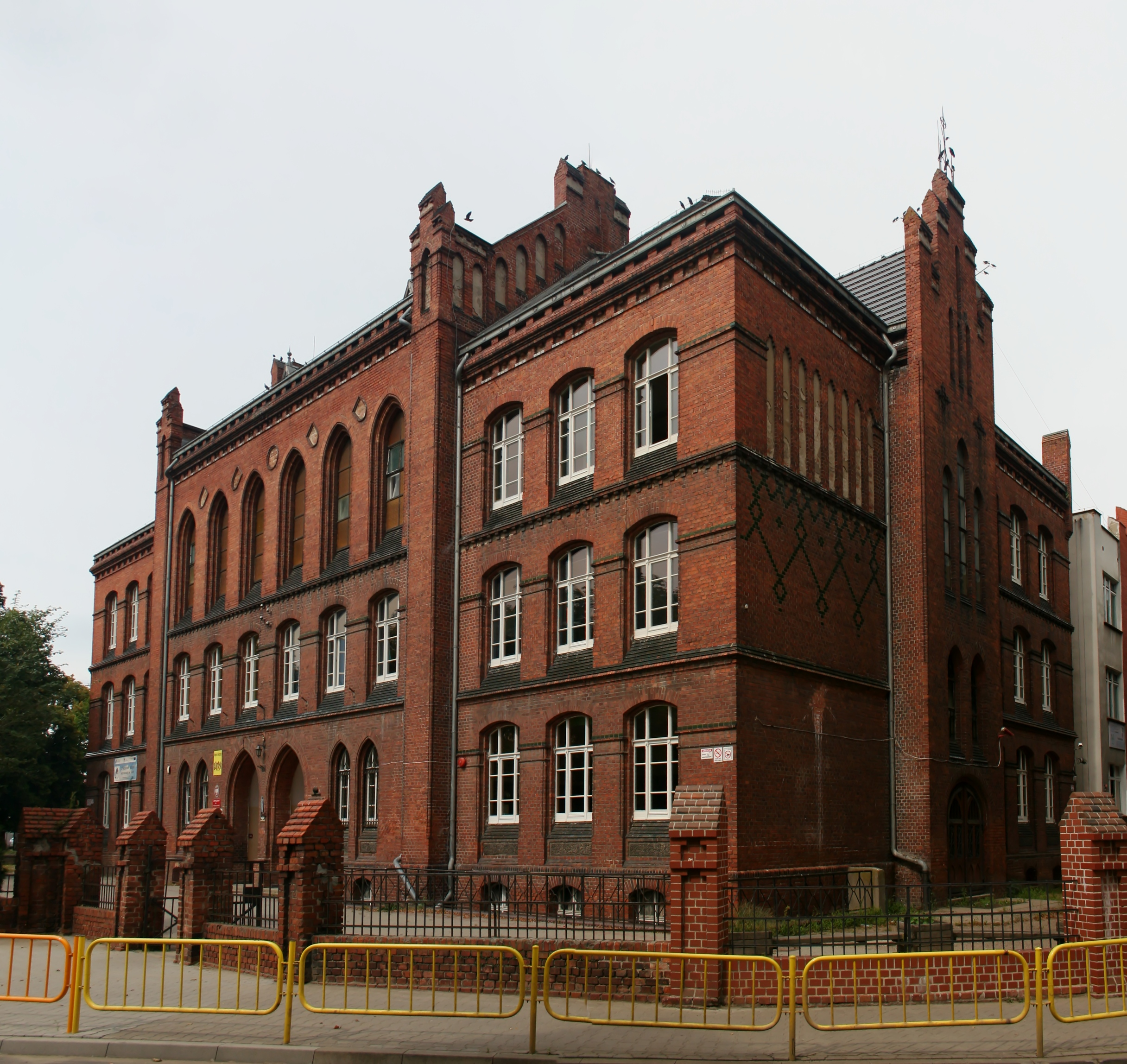 Międzychód, ul. Iczka 3. Szkoła powszechna, ob. gimnazjum, 1903.